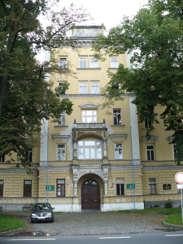 Česky: velitelská budova - prostřední budova Vojenské akademie v Hranicích